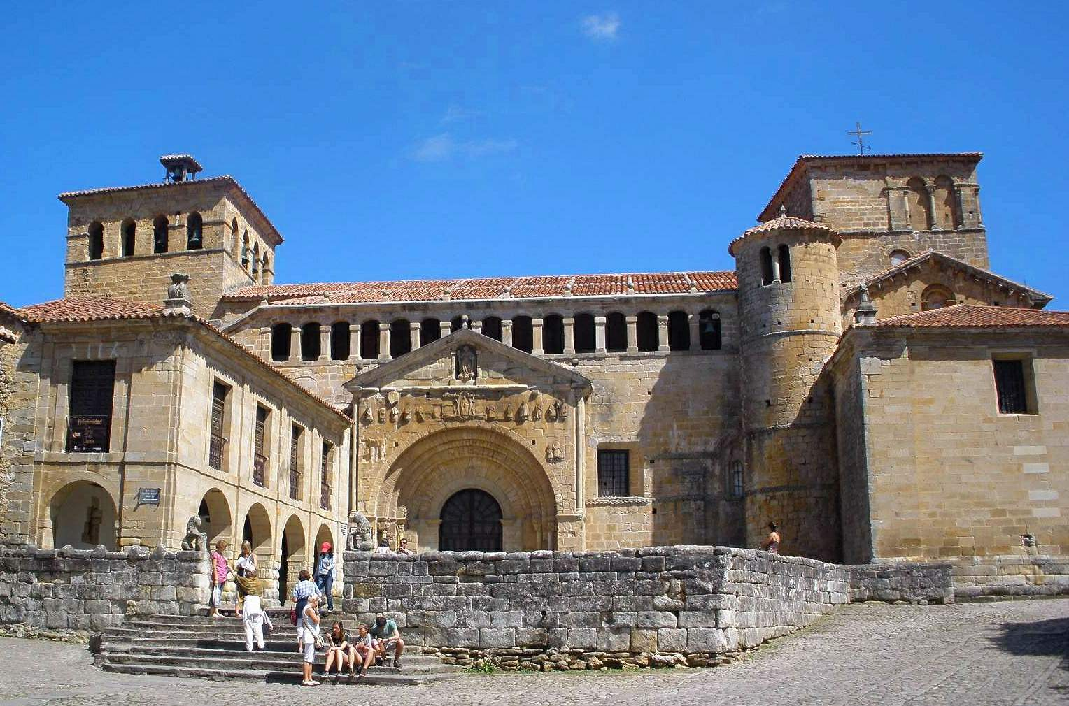 Colegiata de Santa Juliana, Santillana del Mar (Cantabria)